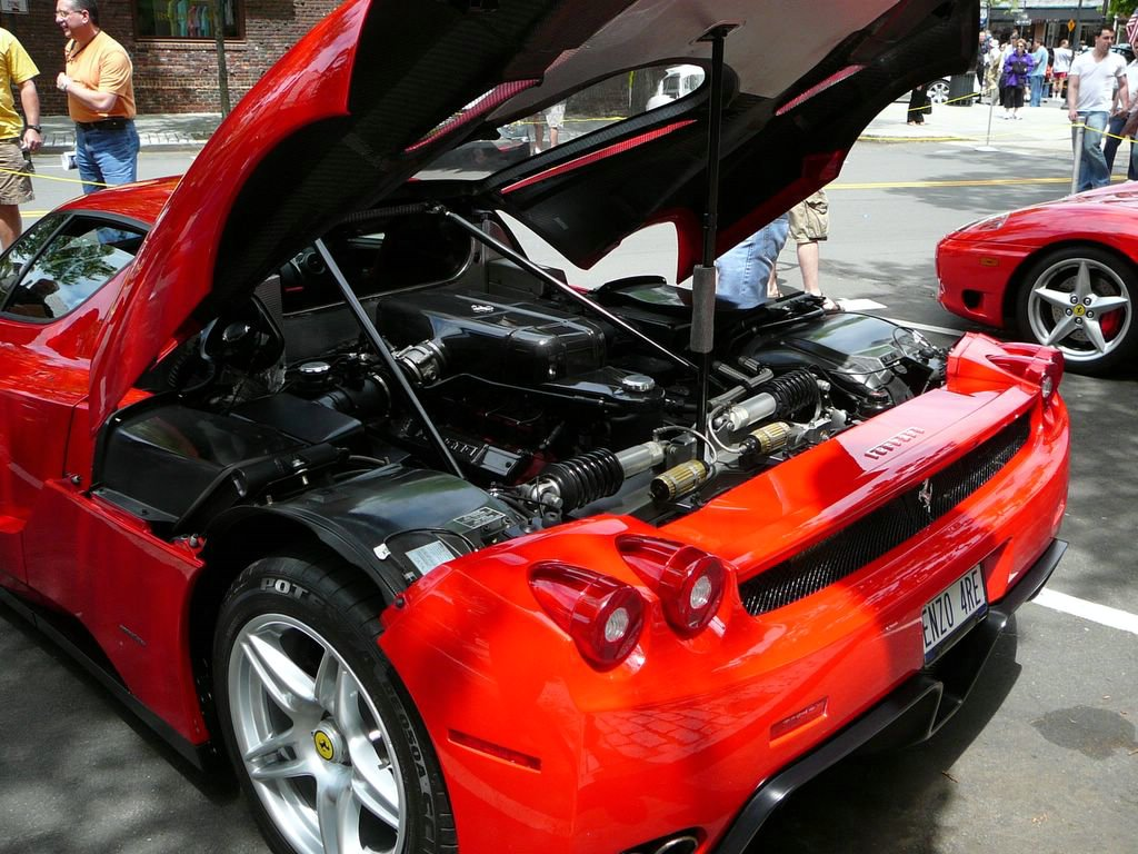 Motor van Ferrari Enzo.